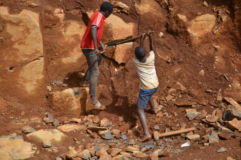 La période des vacances est l'occasion pour les jeunes du village de s'occuper. Certains optent pour la carrière. ils s'y rendent pour gagner le pain quotidien